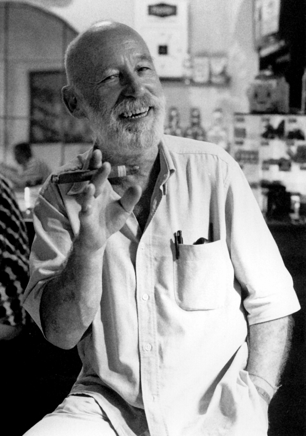 Der Autor lachend bei der Arbeit.